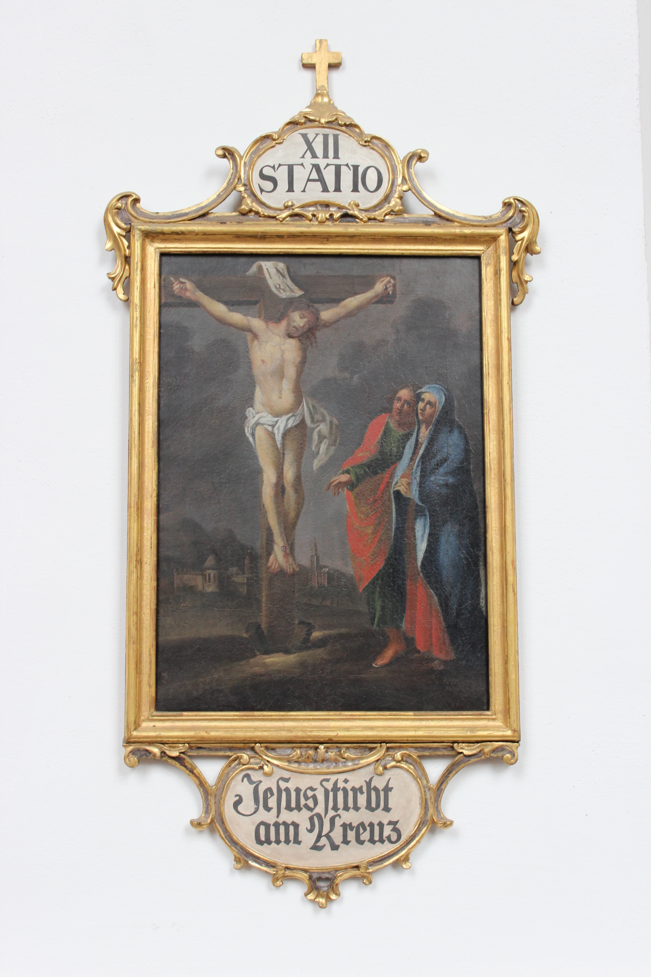 12. Station des Kreuzwegs der Heidelberger Jesuitenkirche